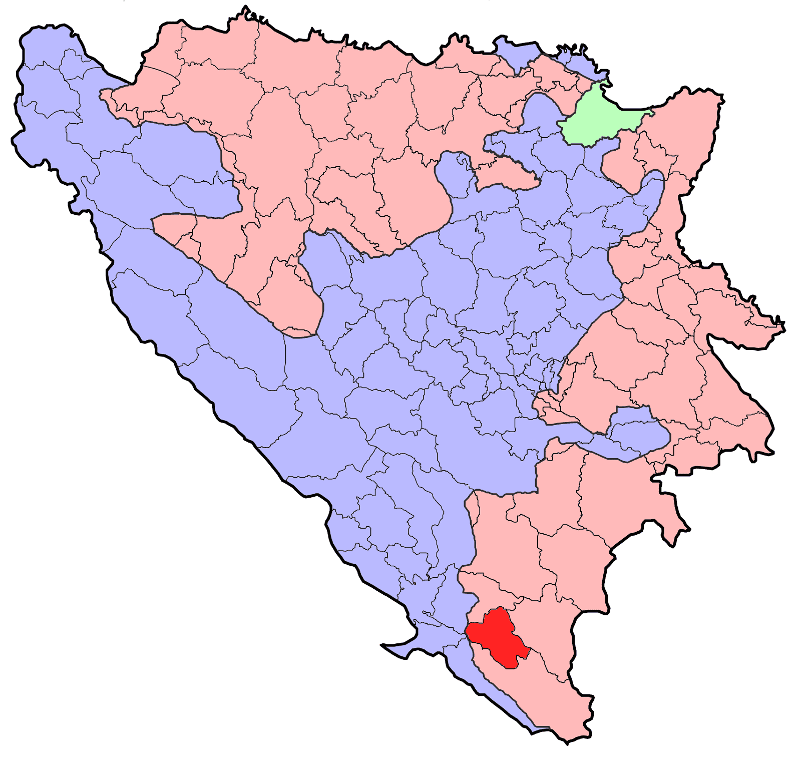 Republika Srpska (BiH) municipality